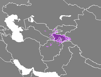 Idioma tayiko (dialecto del idioma persa)